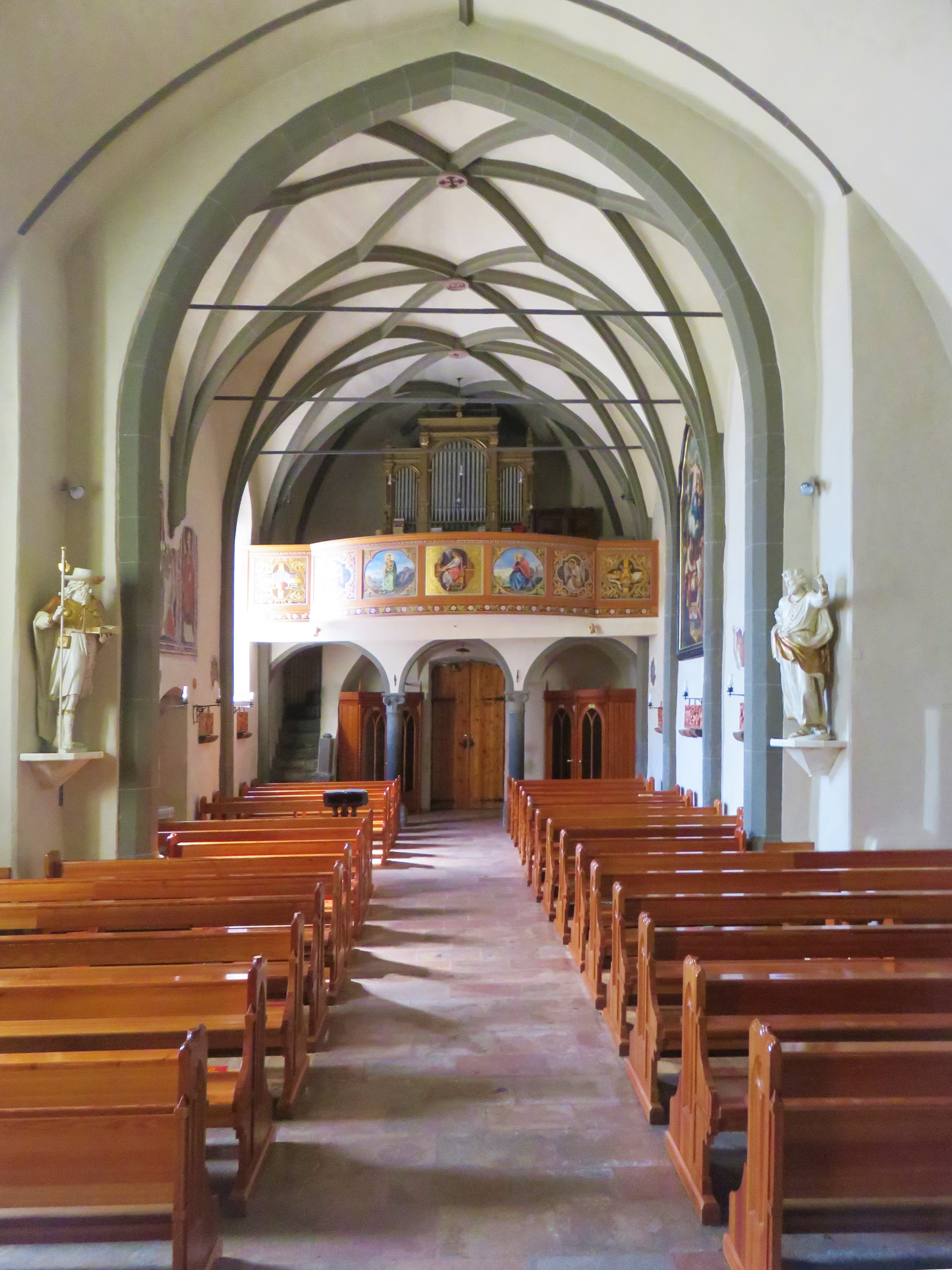 Chiesa dei Santi Filippo e Giacomo a Campitello di Fassa. Interno. Navata con organo. Ai lati della navata statue di San Filippo e San Giacomo.